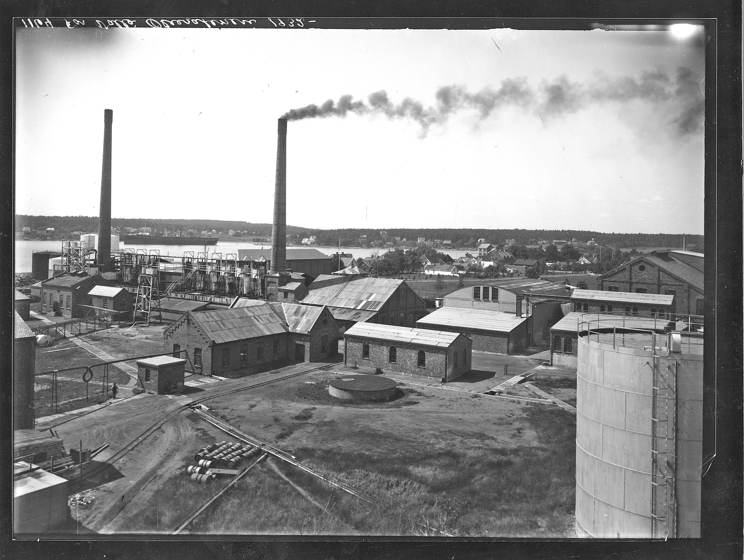 Bildet er hentet fra Arkivverket. Sett fra sør-øst. Midt i bildet: Pumpehuset. Til høyre : Vaskeri for filterduker. Hvalkokeri i bakgrunnen. Arkivinstitusjon : Statsarkivet i Stavanger Arkivnavn : Pa 1536 - Esso Norge as, Vallø Oljeraffineri og lager Sted : Norge, Vestfold, Tønsberg, Valløy Emneord: Olje, Oljeraffineri, Petroleum Avbildet